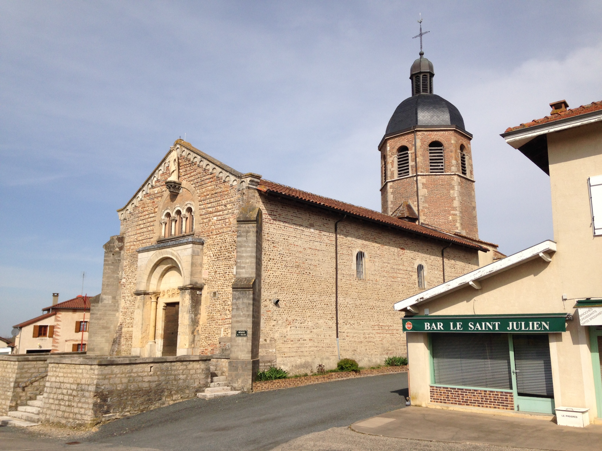 Église du village de Saint-Julien-sur-Veyle